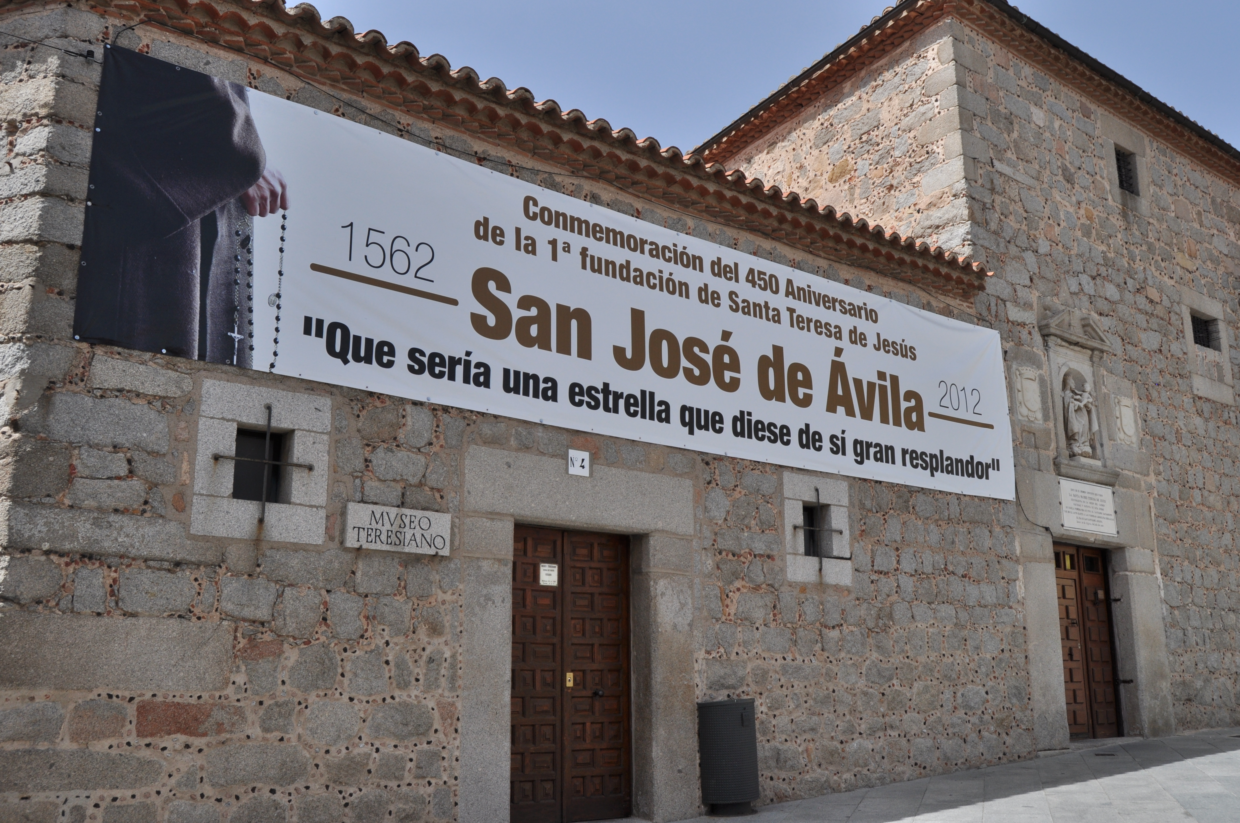 Avila Capital - 164